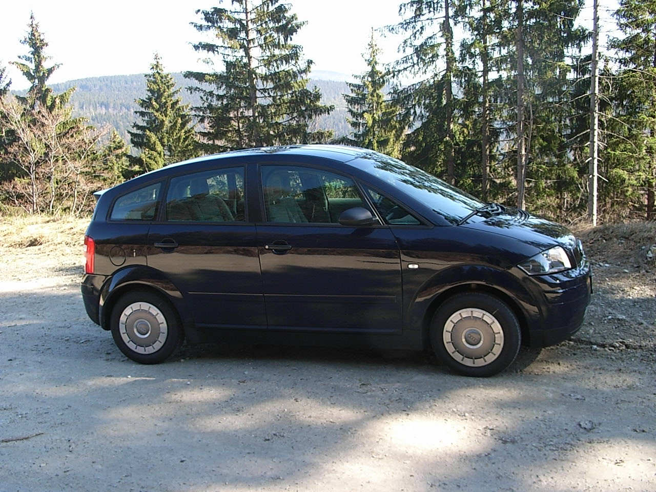 Audi A2 1.2 TDI